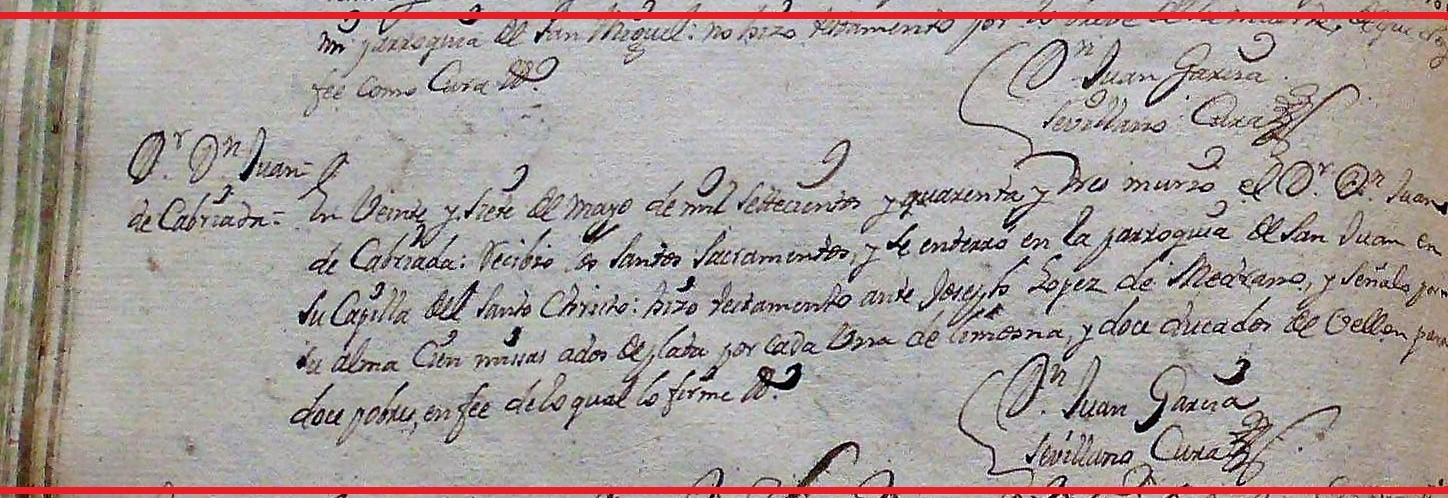 Partida de defunción